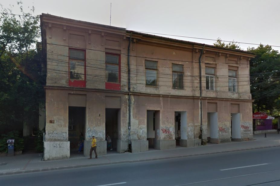 Casa Dimitrie Ghika